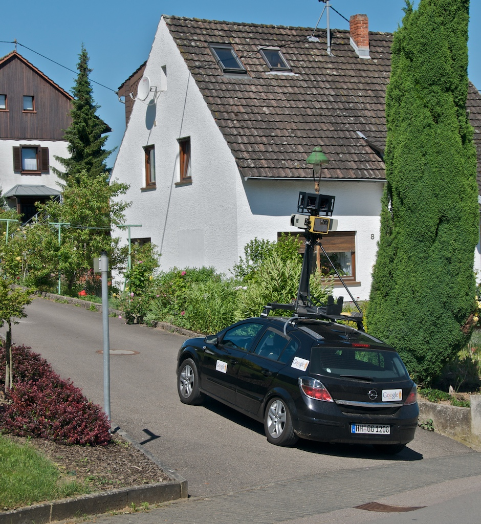 E Google-Maps-Auto um Tour